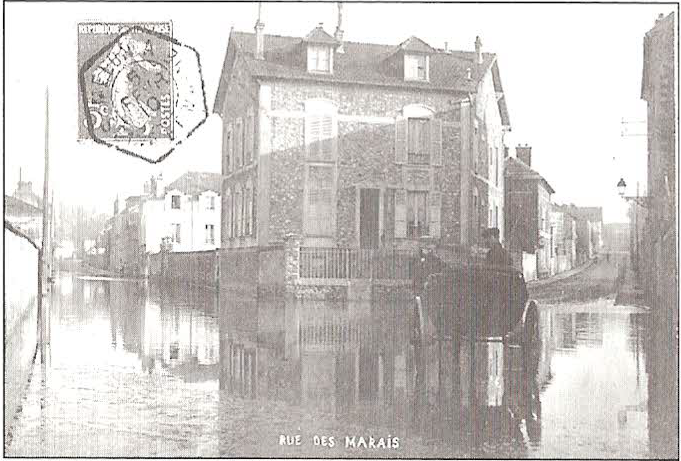 La rue du Marais, à Melun, Seine-et-Marne.